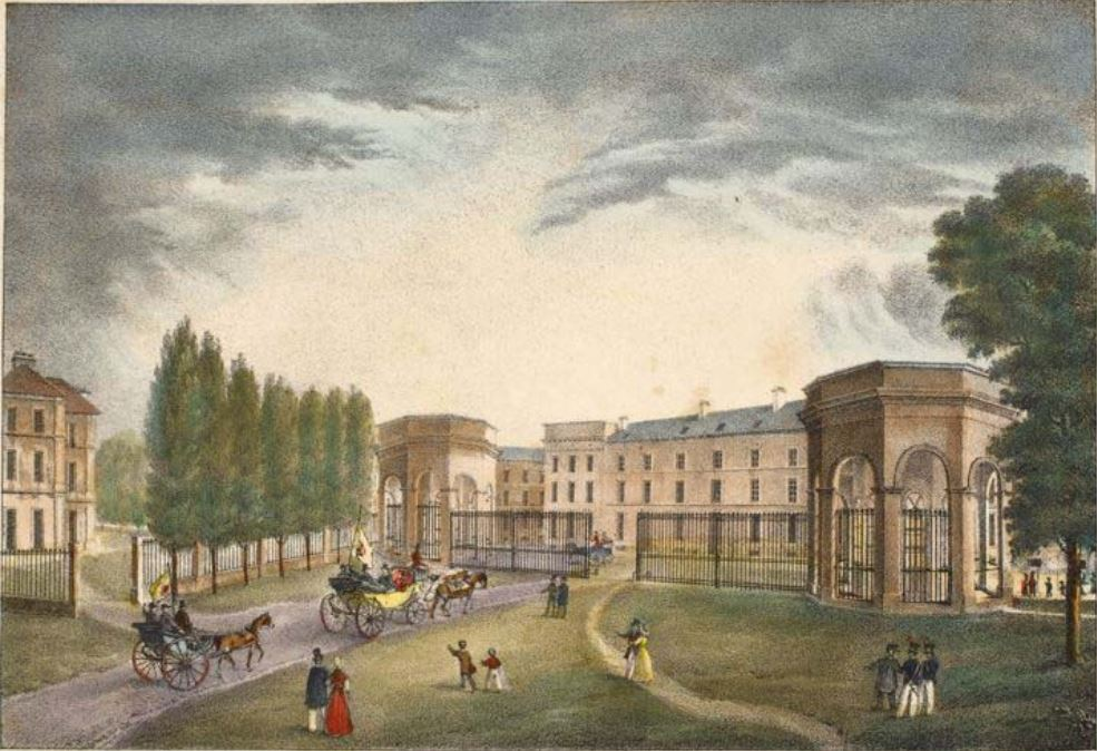 Porte de Louvain à Bruxelles.